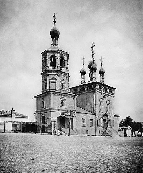 Церковь Похвалы Богородицы в Башмаках